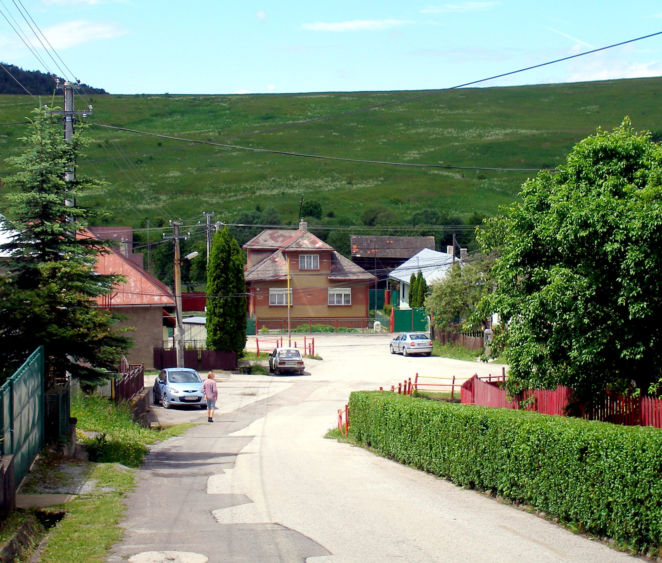 Obec Lúčka okres Sabinov.